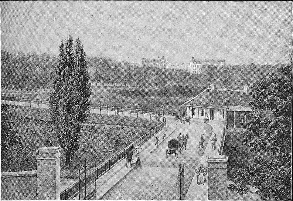 Udsigt fra Nørreport ud over Nørrebro i første halvdel af 1800-tallet.